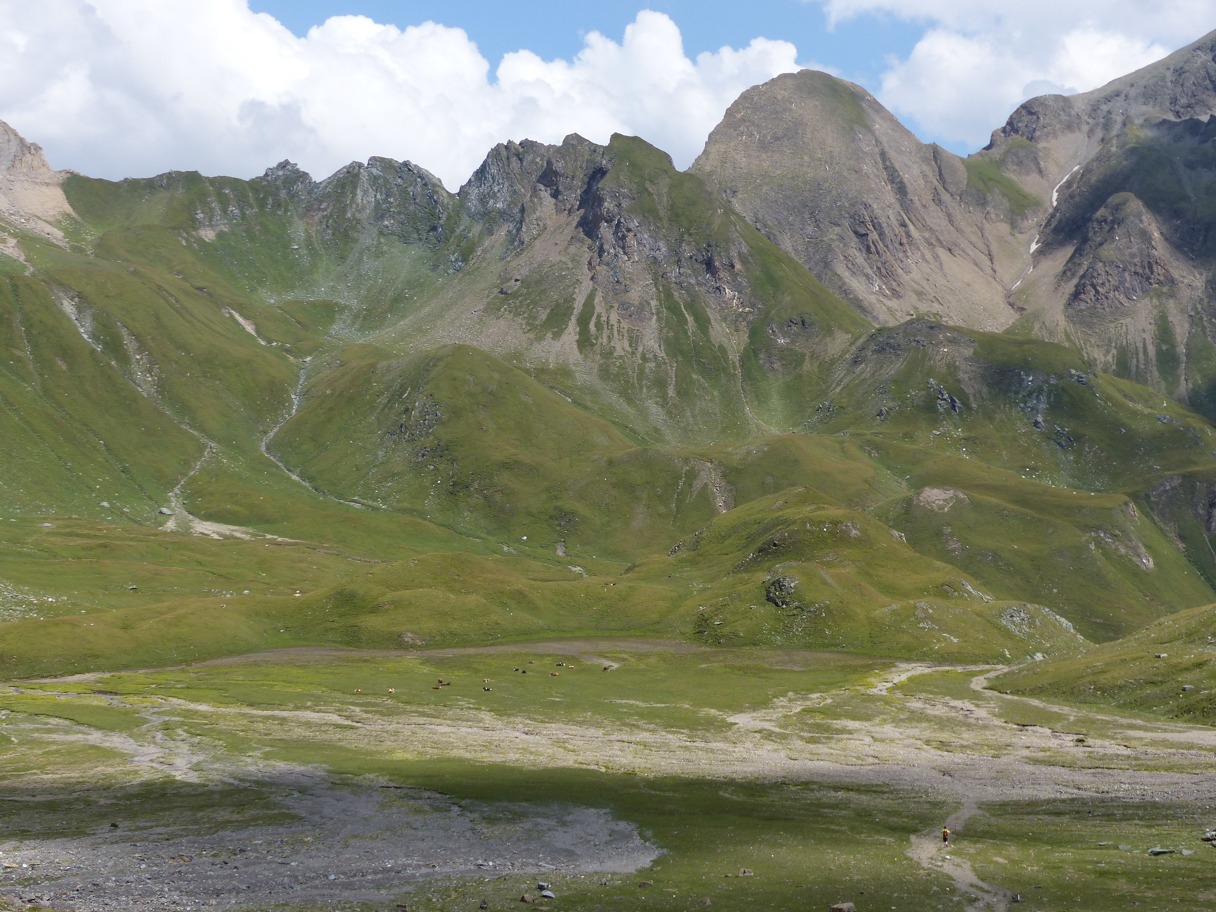 Almgebiet „In der Pfann“: Pfannespitz (Mitte, vorne), Eselskopf (rechs der Bildmitte)